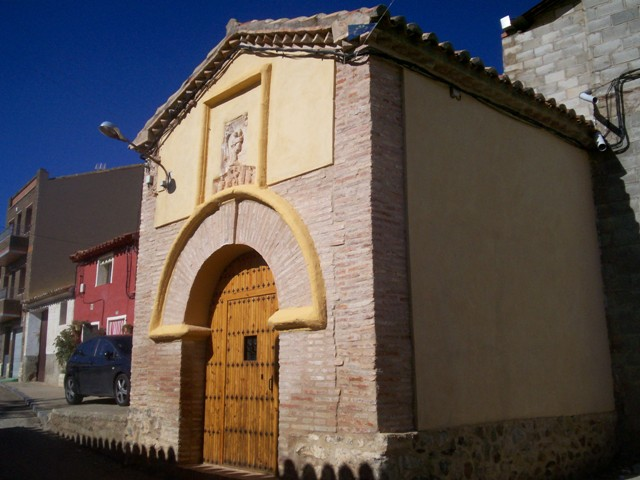 Ermita de Santa Ana de Villar de los Navarros